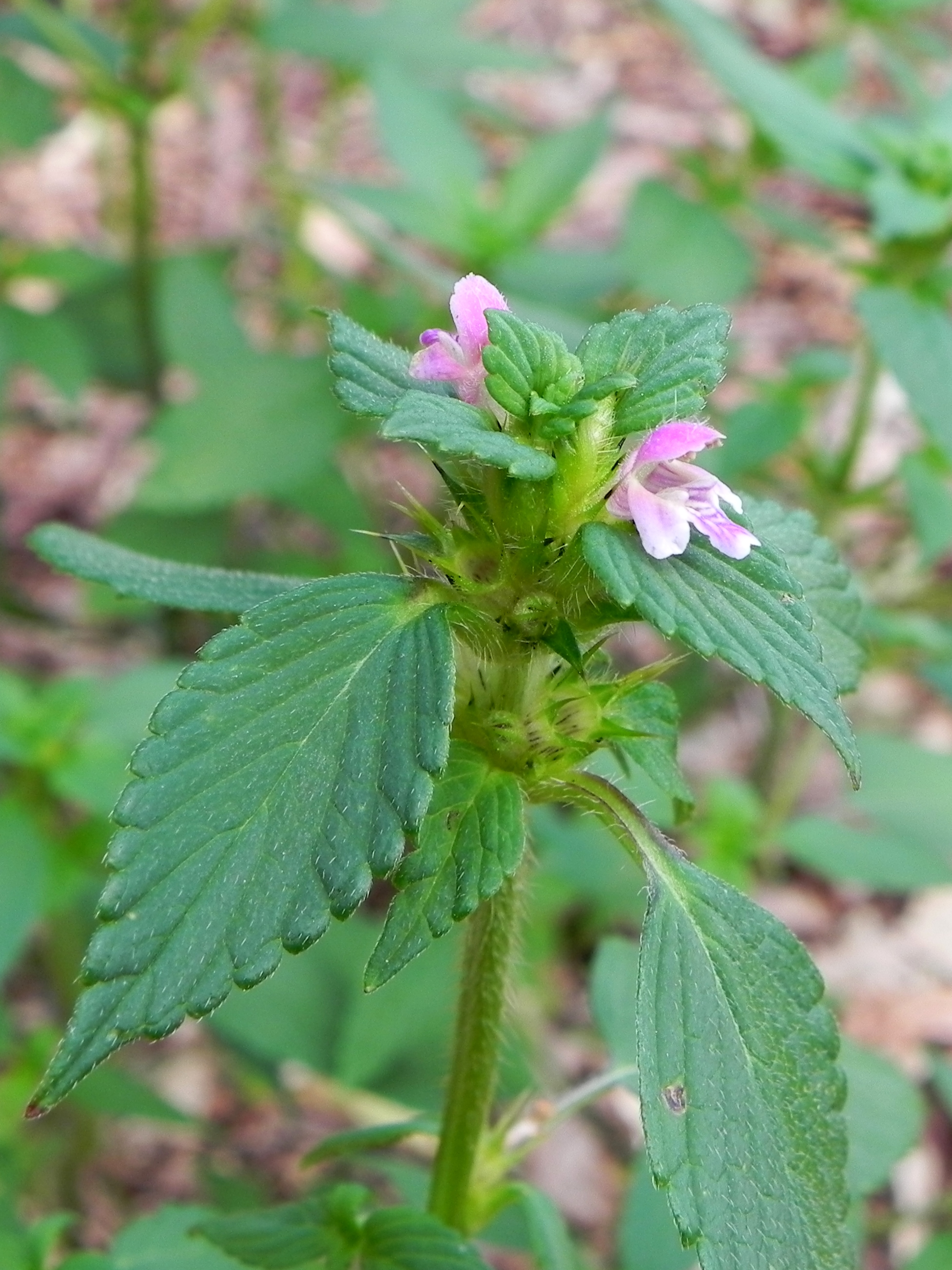 Stechender Hohlzahn (galeopsis tetrahit) im Naturpark Südheide (Germany)